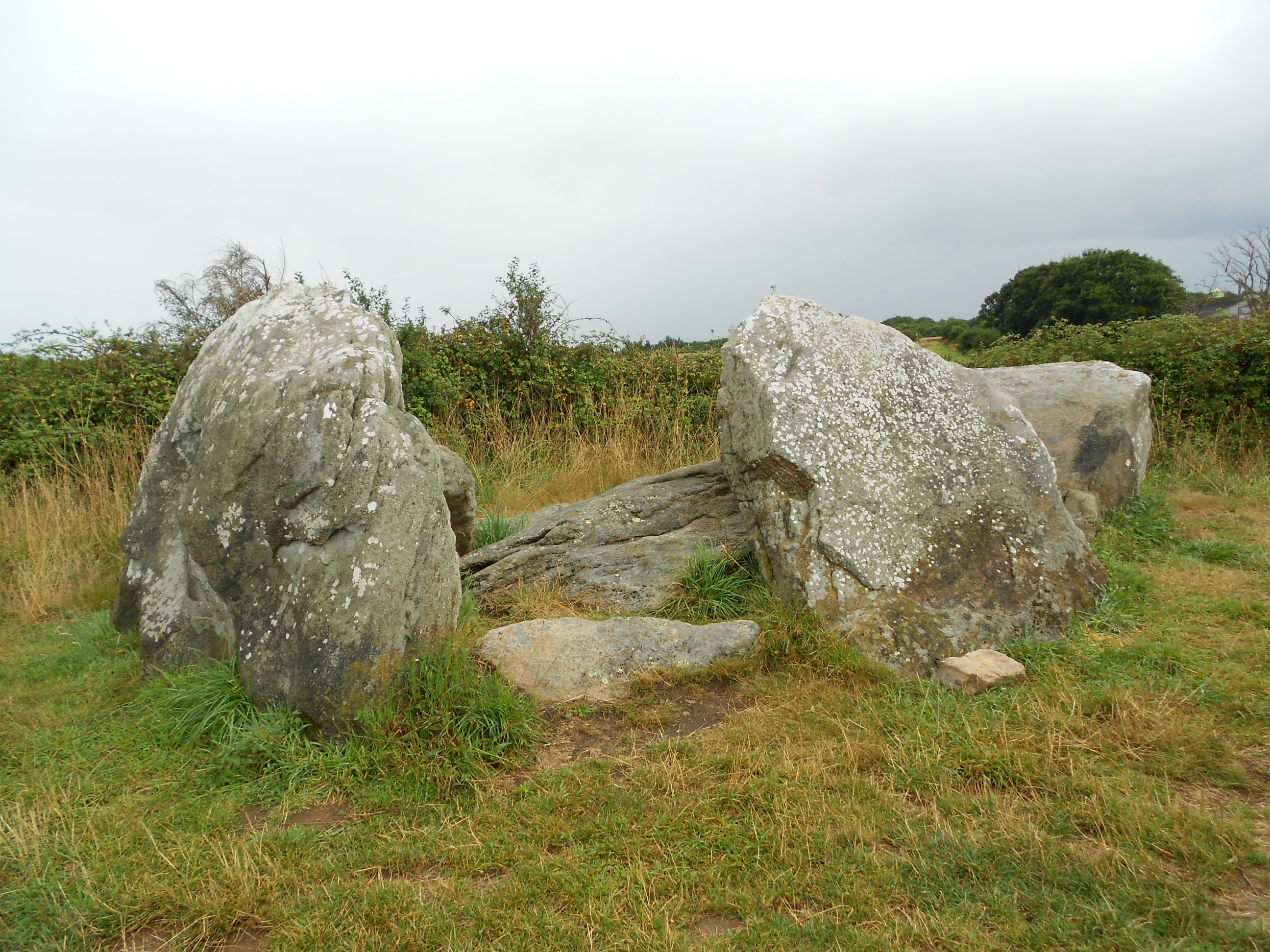 Dolmen de Kerbourg, Saint-Lyphard